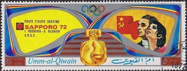 Alexei Ulanov and Irina Rodnina